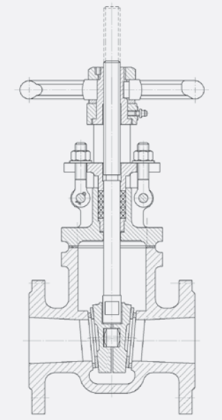 Gate valve